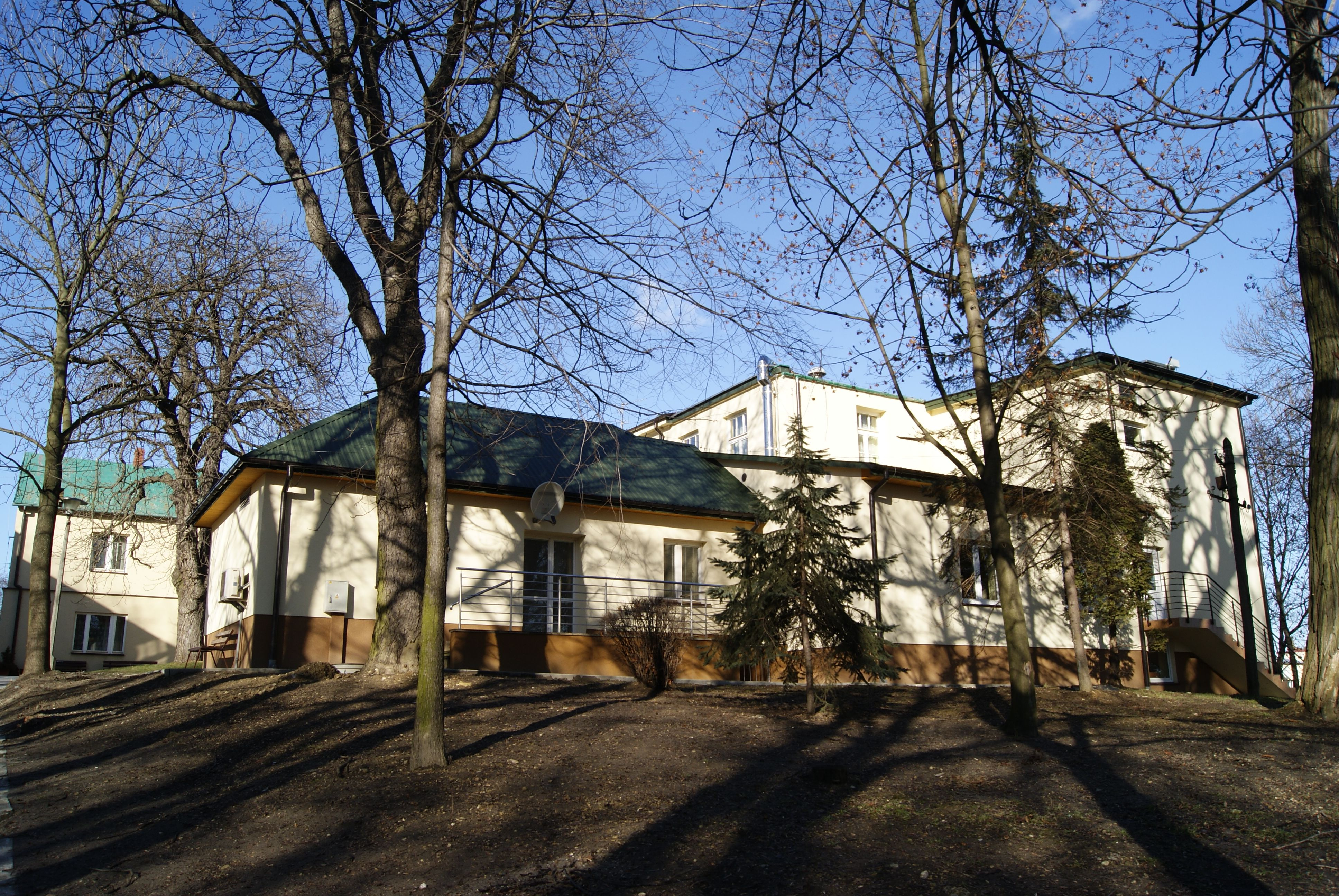 Szpital św. Mikołaja Busko-Zdrój ul. 1 Maja 3